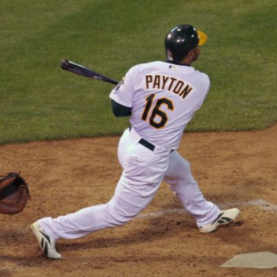 Jay Payton